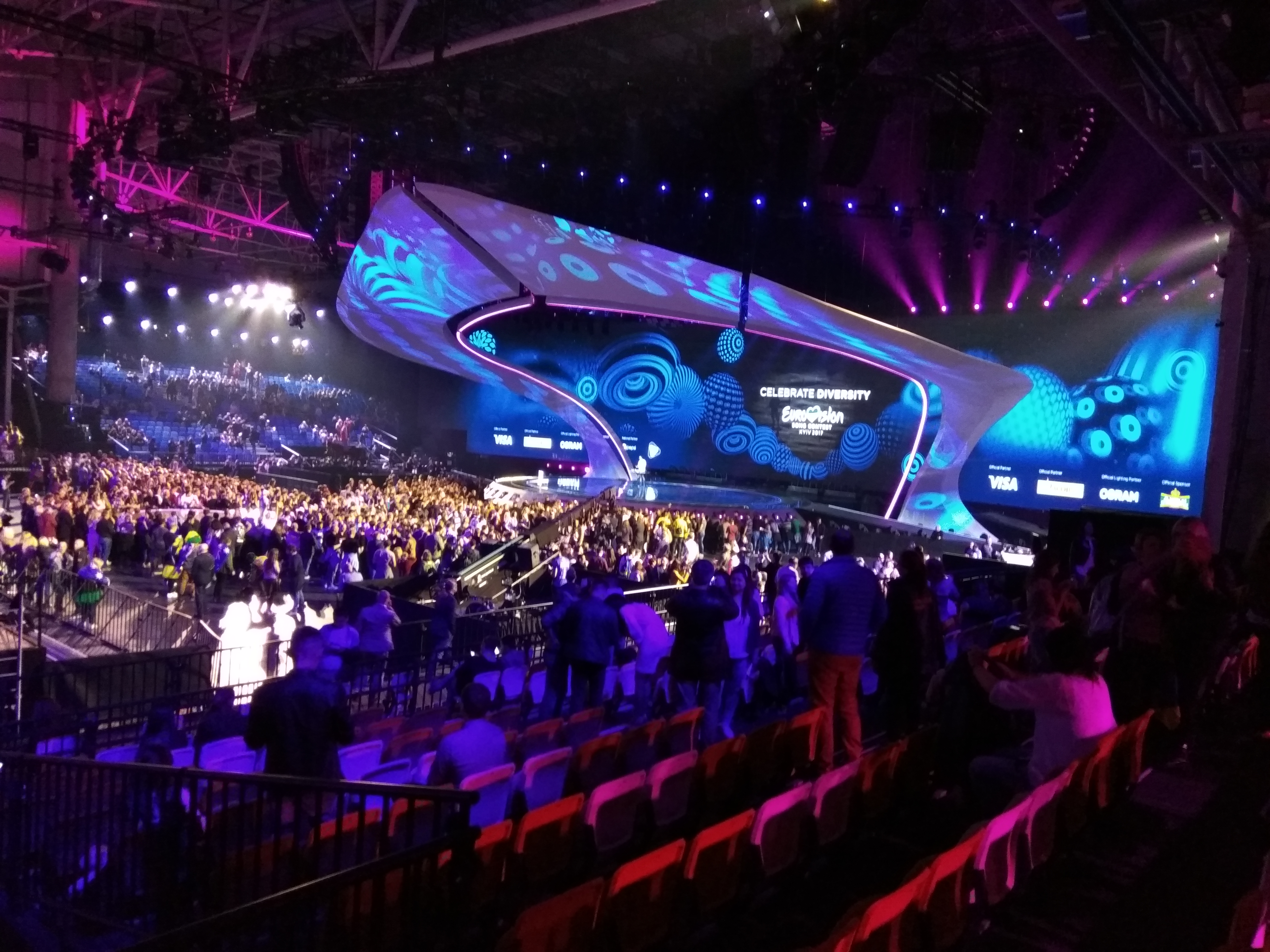 Сцена Євробачення 2017. Перед початком першого півфіналу.